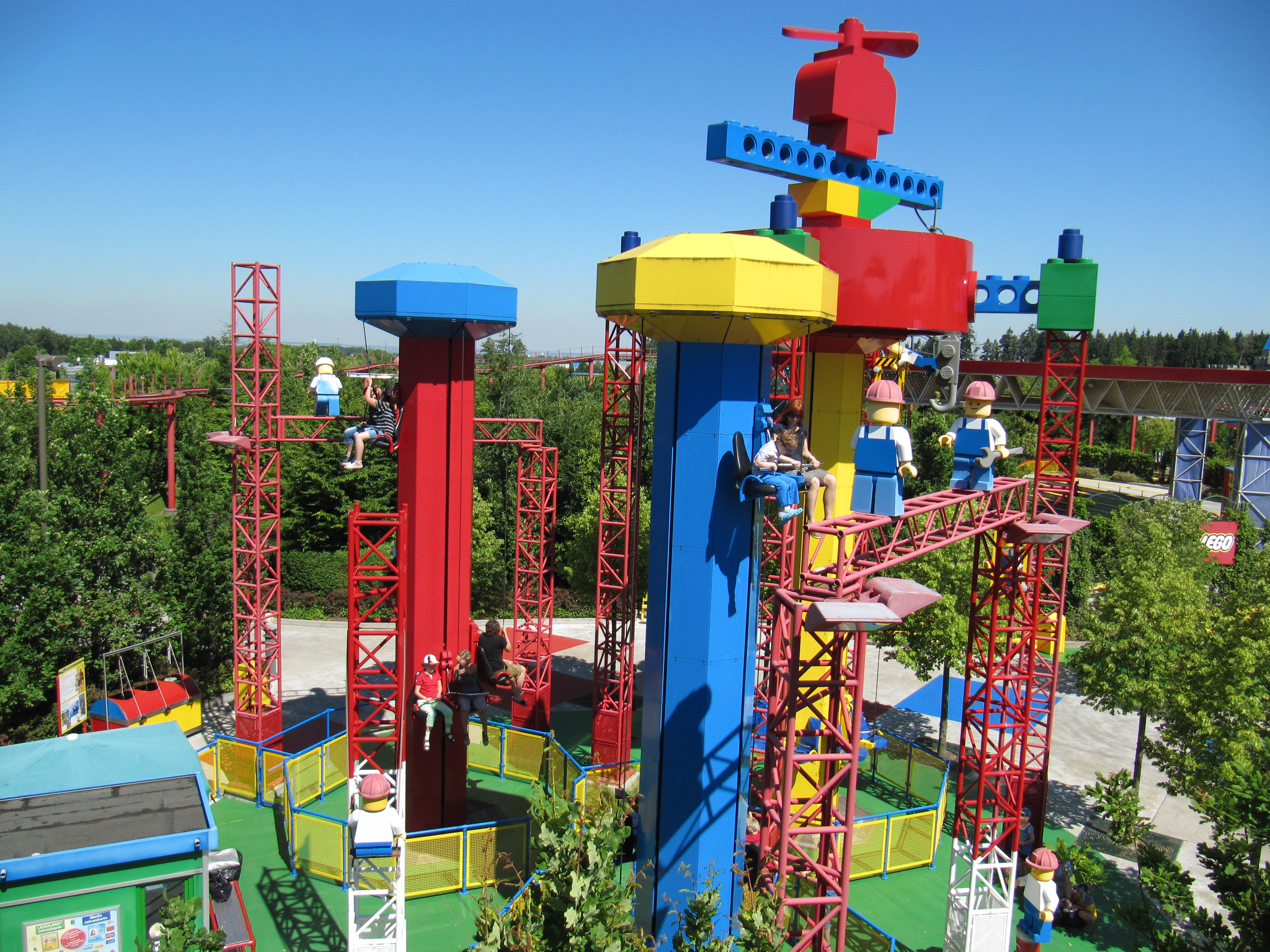 Legoland Deutschland